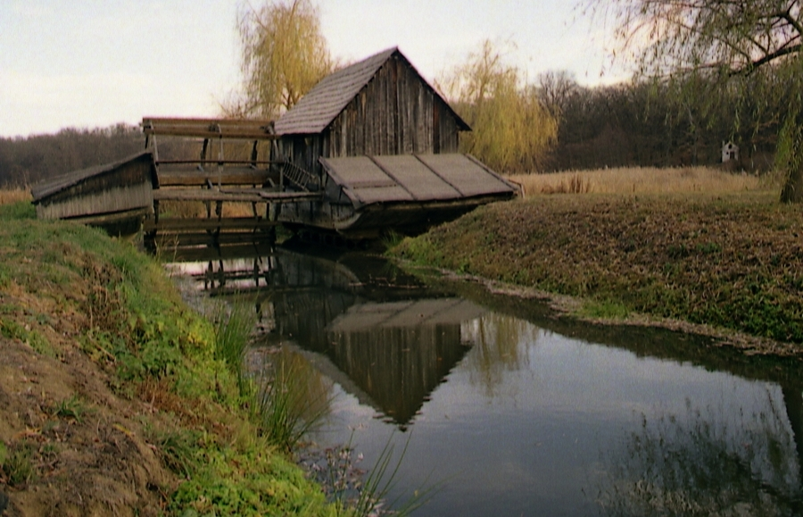 Muzeul_Tehnicii_Populare, Sibiu, Romania